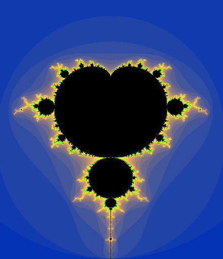 Mandelbrotmängden, (en fraktal). Andra bilder i samma serie: Icke linjära fraktaler: Exempel på Juliamängden Exempel på den tomma Juliamängden Newton-Raphsons metod Kategori:Bilder av fraktaler